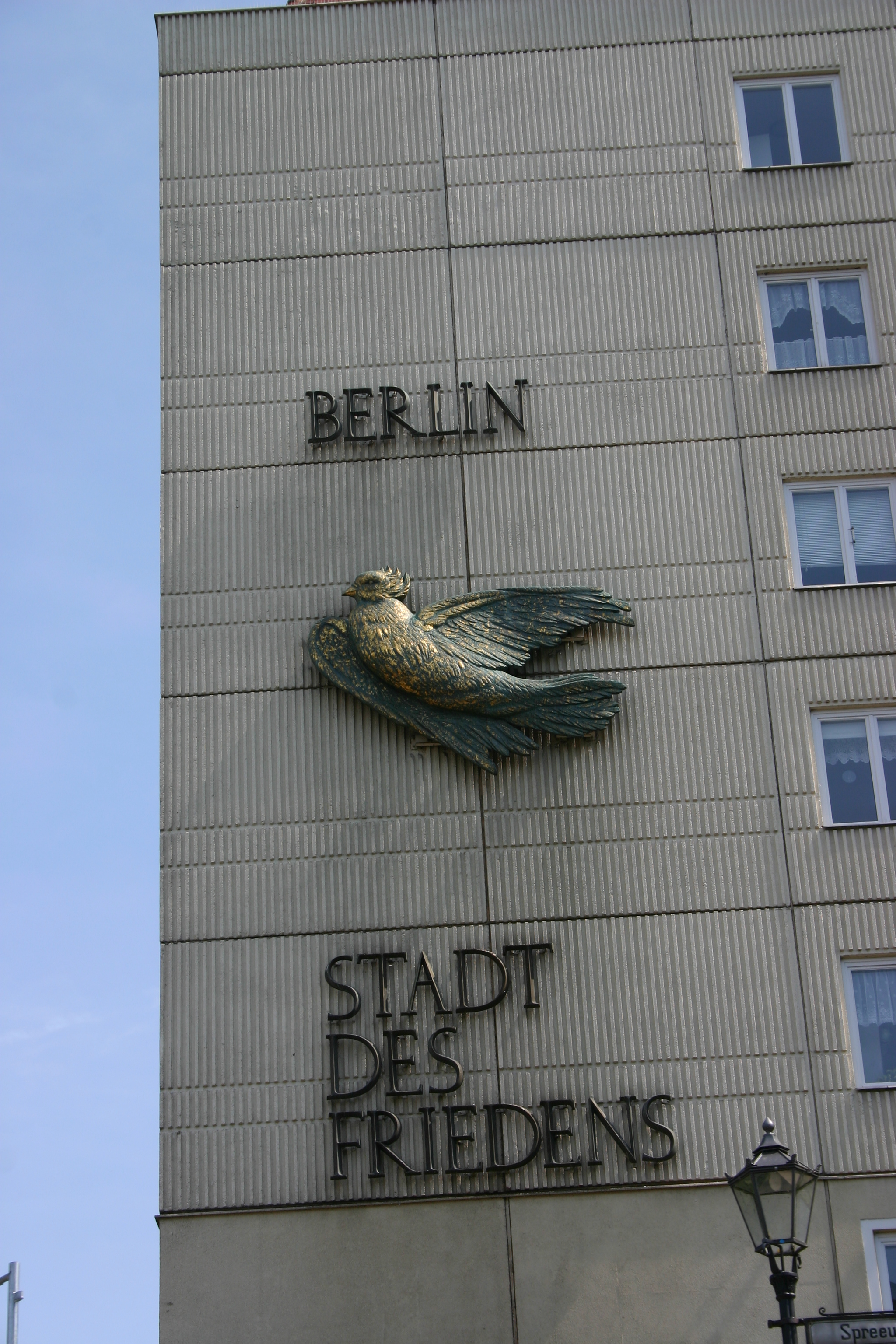 Building with Art in Berlin Dove and text Berlin - Stadt des Friedens